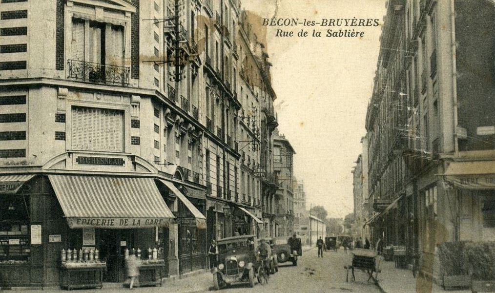 Asnières, quartier de Bécon-les-Bruyères, département des Hauts-de-Seine, France, rue de la Sablière.